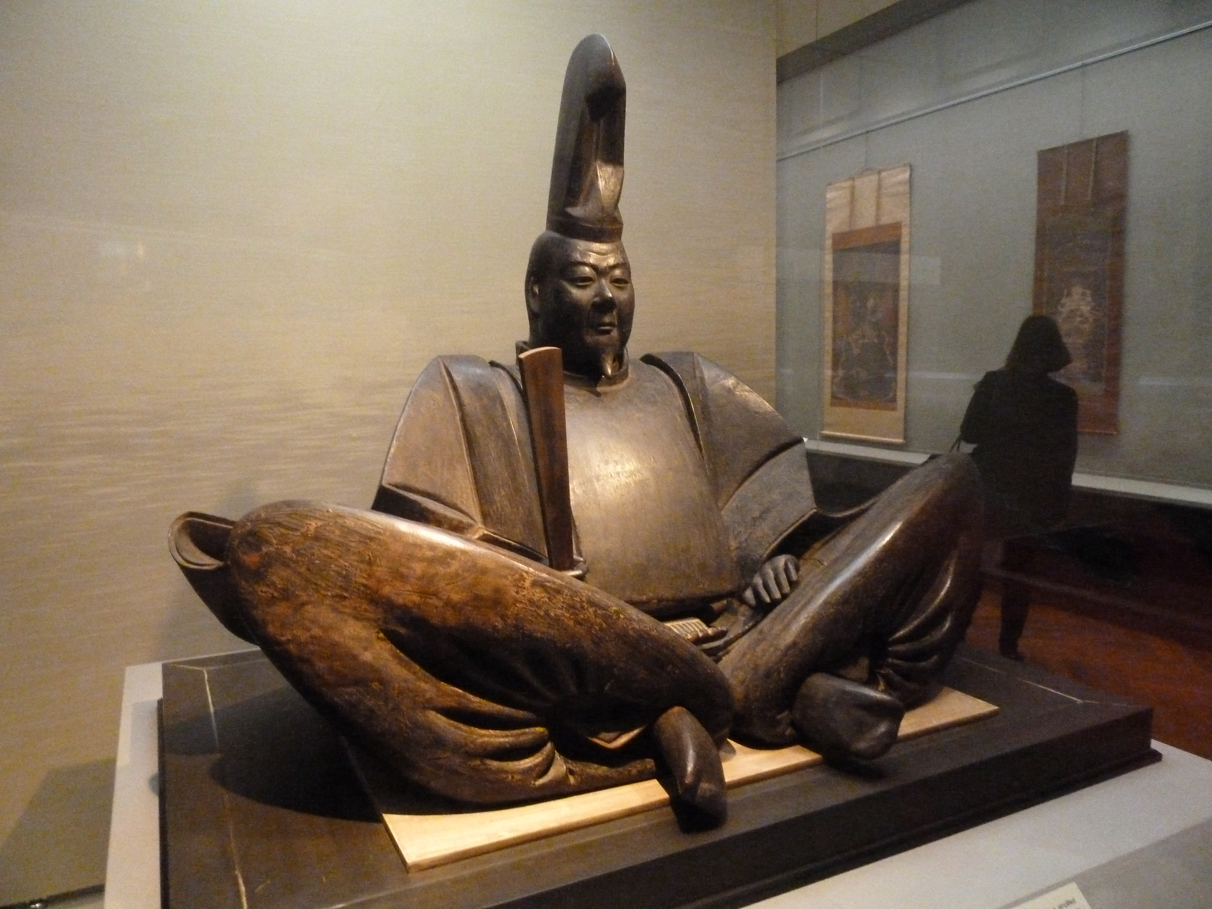 Manamoto no Joritomo statula. Pirmojojo Kamakuros Šiogūnato šiogūno nuo 13 iki 14 amžiaus.